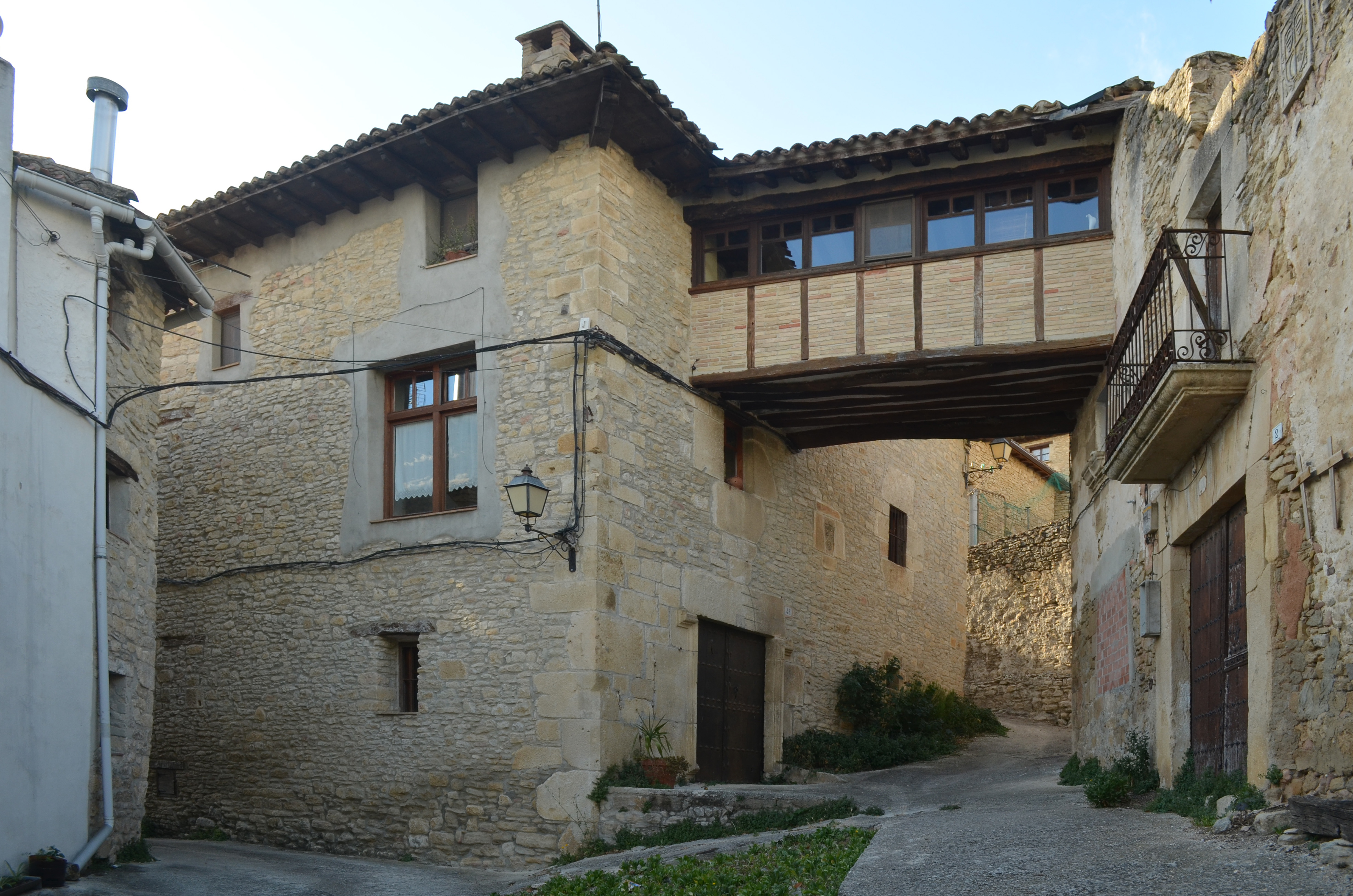 Casa con galería sobre la calle en Azcona (Navarra, España)